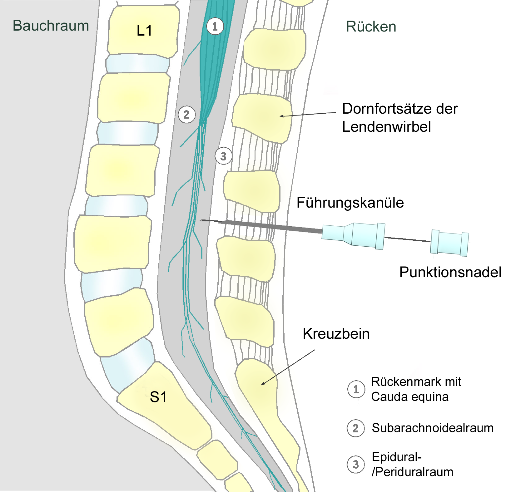 Prinzip der Durchführung einer Spinalanästhesie. Durch die zuvor zwischen den Dornfortsätzen der Wirbel L3/4 eingebrachte Führungskanüle wird die eigentliche Spinalnadel eingeführt und mit ihr der Subarachnoidalraum punktiert. Durch diese Nadel können dann Lokalanästhetika und andere Medikamente injiziert werden. Gezeigt ist ein medianer Schnitt in der Sagittalebene. Vereinfachte Darstellung, die Größenverhältnisse stimmen nicht mit der Realität überein. Principles of performing a spinal anaesthesia. Using the already introduced cannula between the spinous processes of the L3/L4 vertebrae, the spinal needle is then introduced and punctuated within the subarachnoid space. Through this needle, local anaesthetics and other drugs may be injected. Shown is a median section of the saggital plane. This representation is simplified, and the proportions do not match with reality.